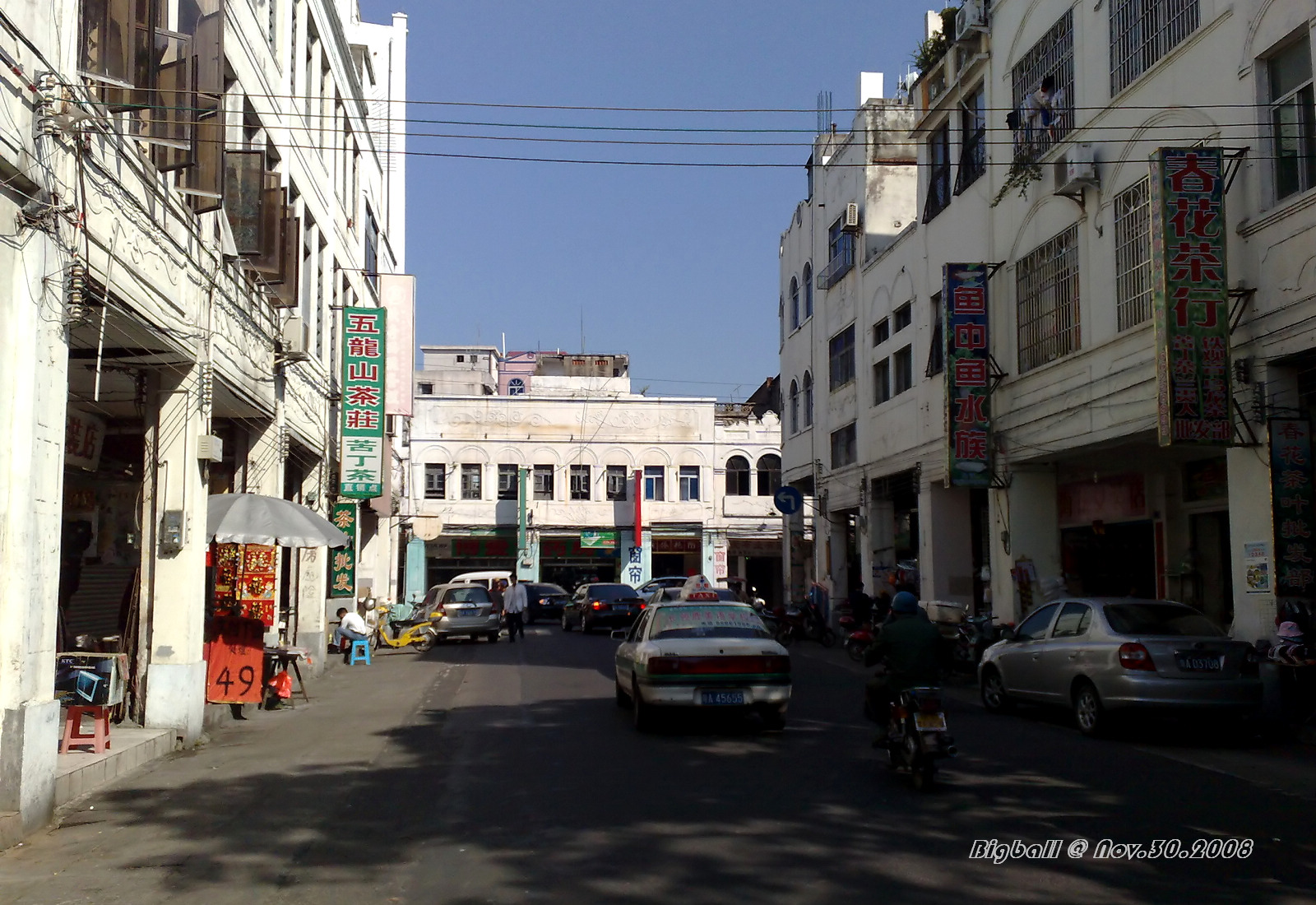 解放东路博爱路-By Bigball